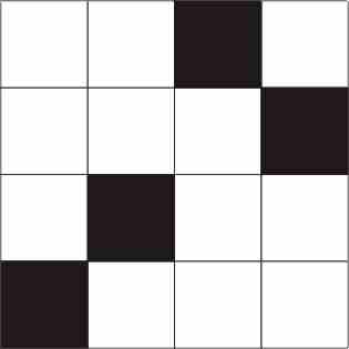 Padrão